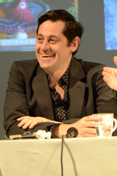 Olivier Py lors d'une rencontre sur le théâtre jeune public à la Maison Jean Vilar à Avignon